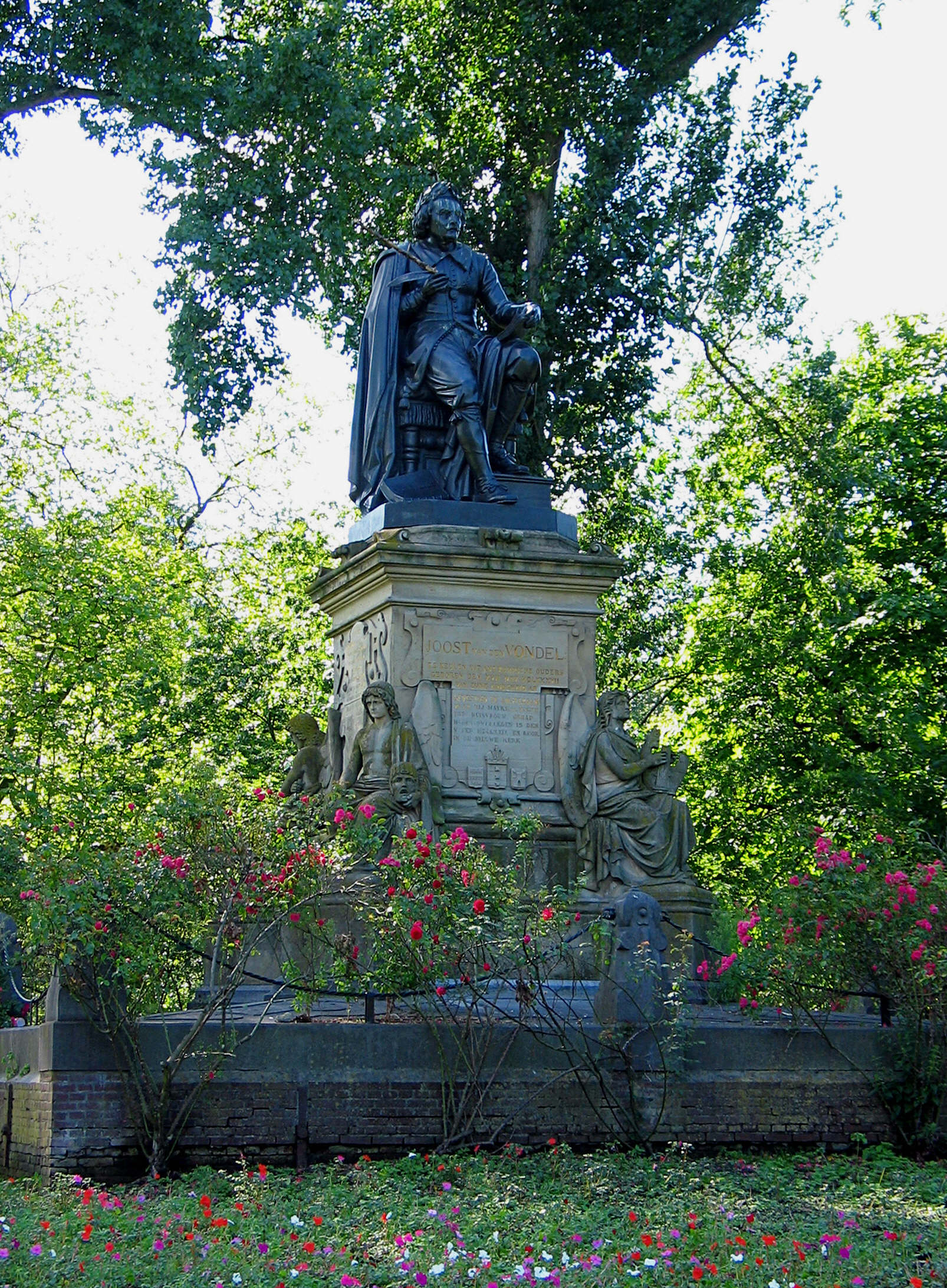 Beeld Joost van den Vondel in het Vondelpark in Amsterdam door Louis Royer in 1867.